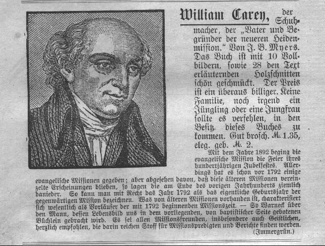 Verlagsanzeige vor 1900 // von mir eingescannt // public domain